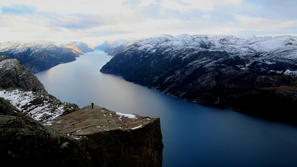 Panoramablick vom Preikestolen, Rogaland, Norwegen. Lysefjord und Ryfylke im Hintergrund. – Canon EOS 350 D